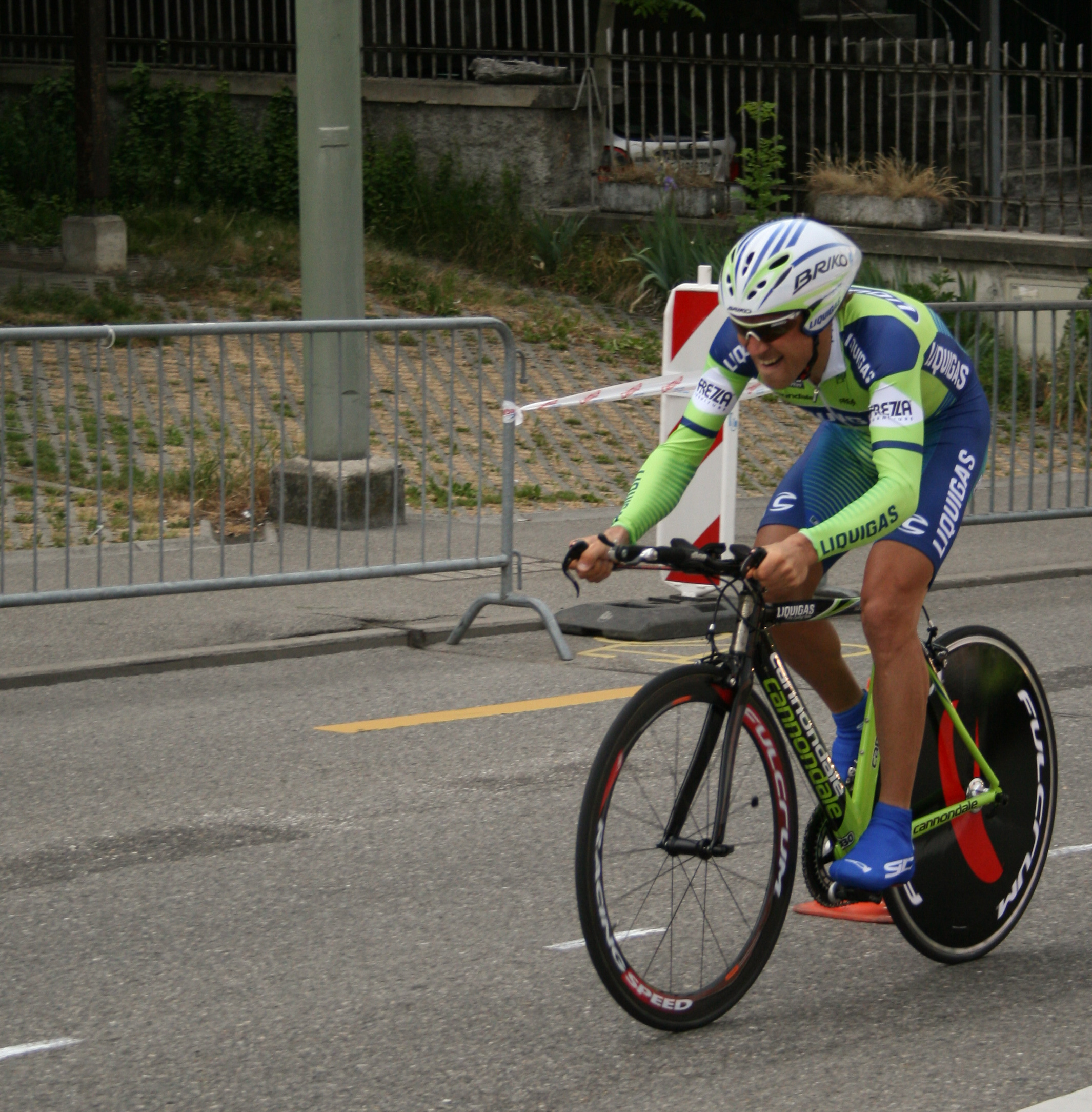 Patrick Calcagni prologue du Tour de Romandie 2007